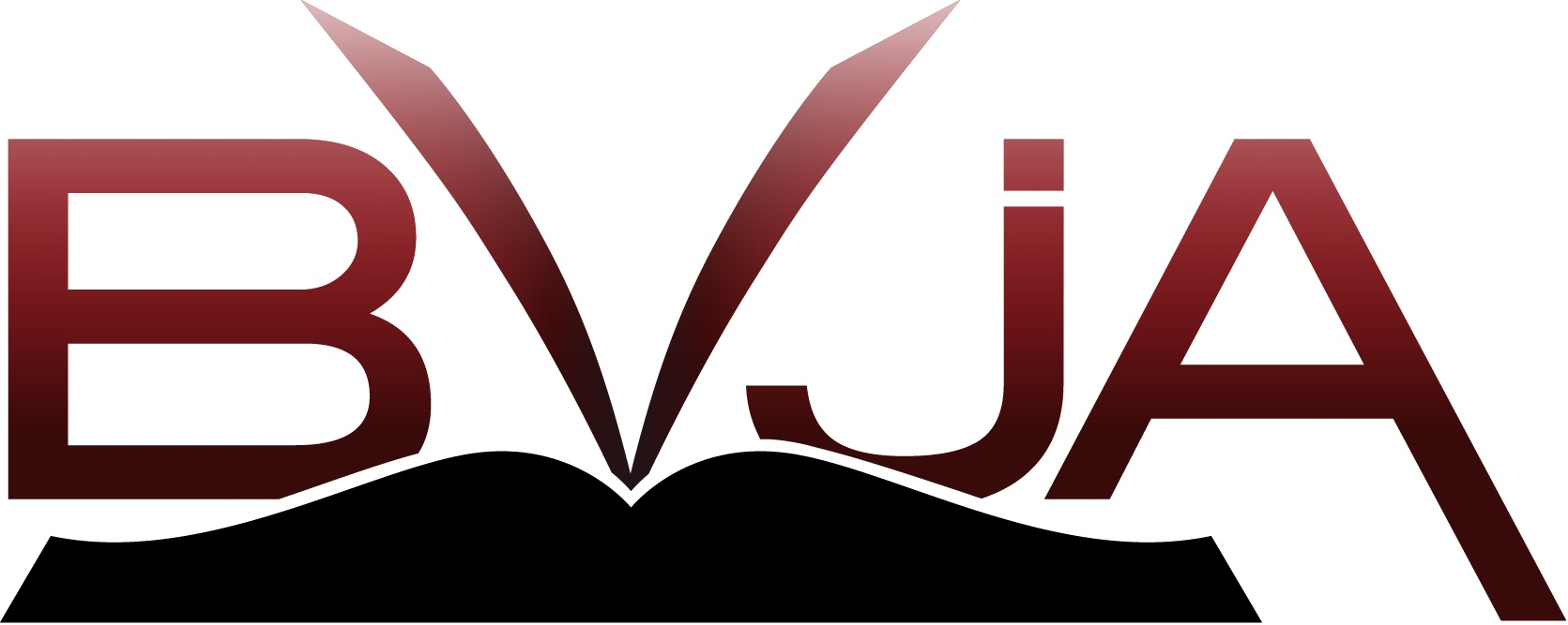 Logo